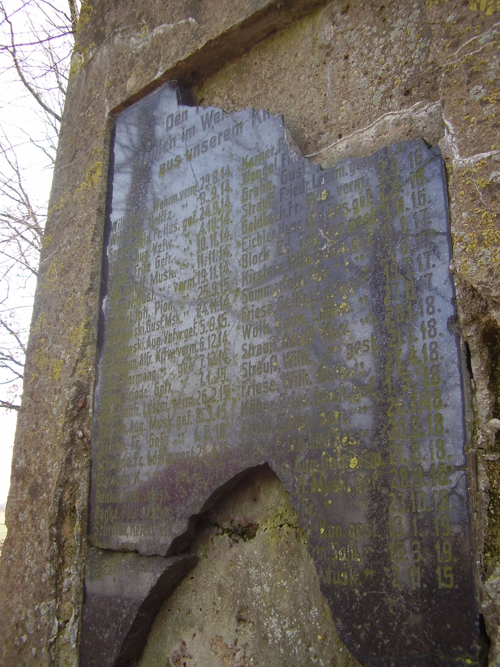 Nazwiska mieszkańców Kalnika poległych w czasach I Wojny Światowej na obelisku